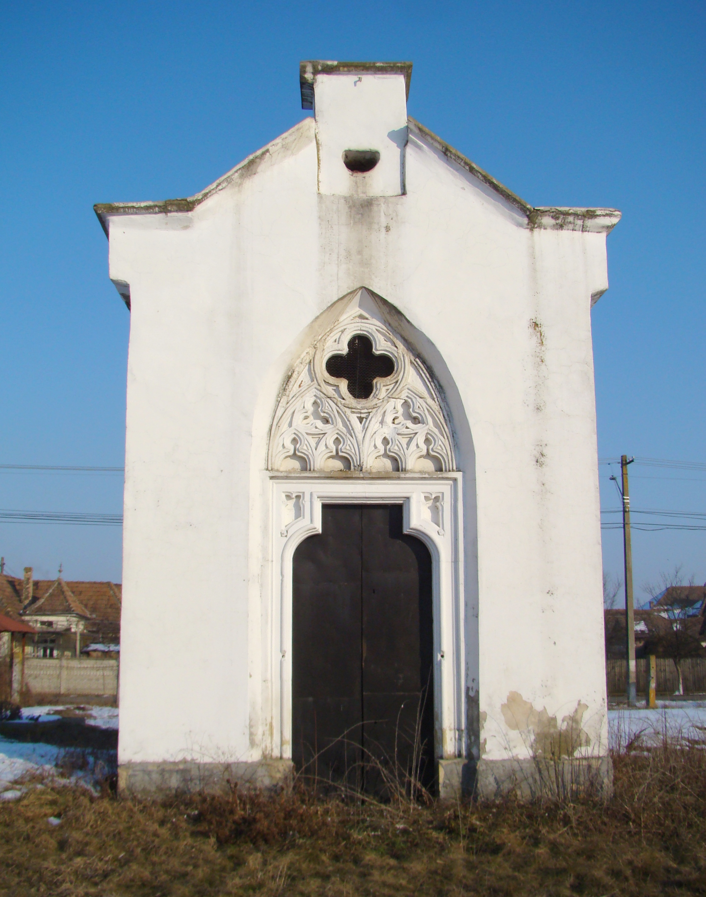 Cripta Degenfeld, sat Cuci; comuna Cuci, județul Mureș